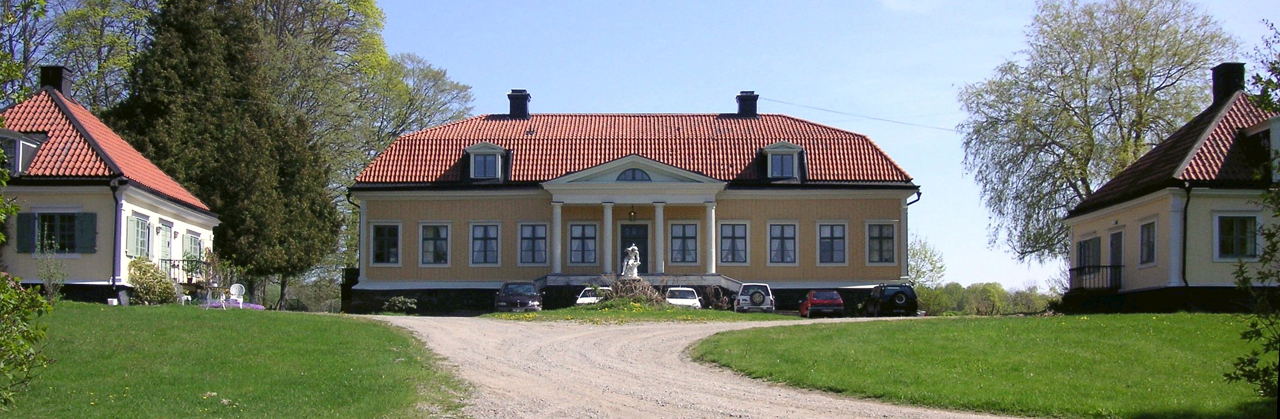 Norsbors herrgård, Botkyrka kommun, fasad mot Mälaren